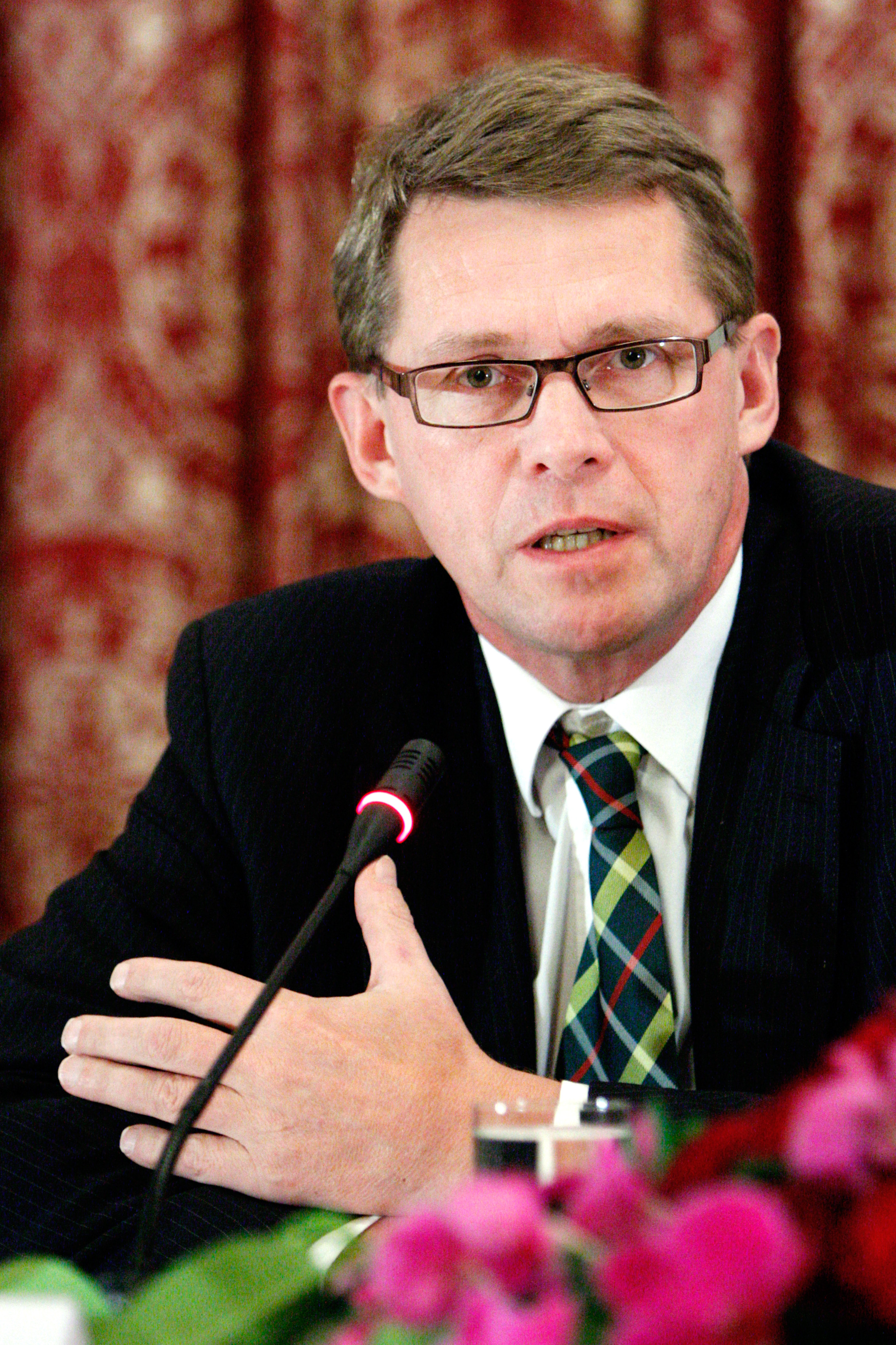 Finlands statsminister Matti Vanhanen under Nordiska Rådets session i Oslo. 2007-10-29. Foto: Magnus Fröderberg/norden.org